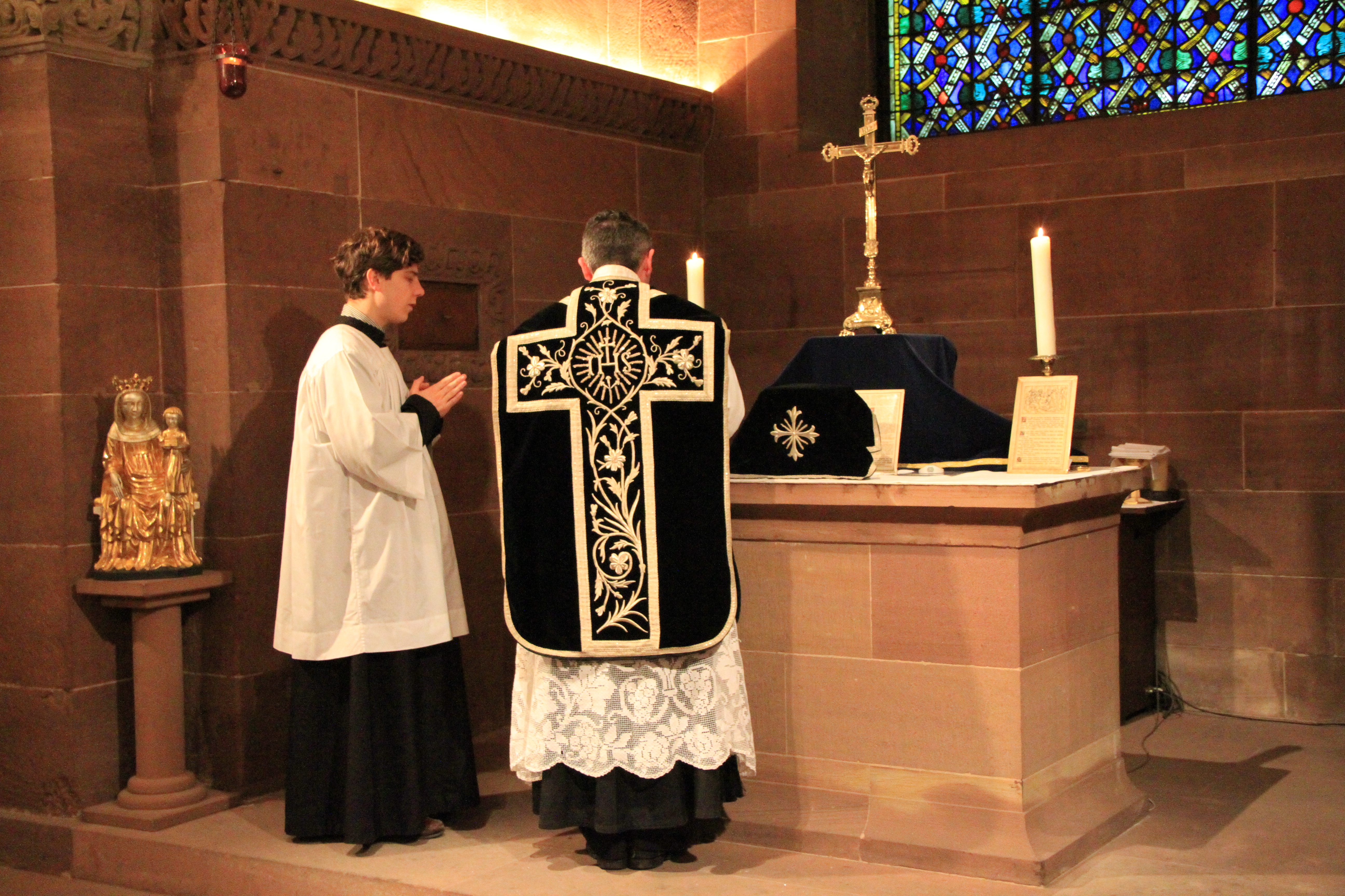 Strasbourg crypte de la cathédrale Notre Dame, messe de Requiem à la mémoire du roy Louis XVI et des martyrs de la Révolution française 19 janvier 2013